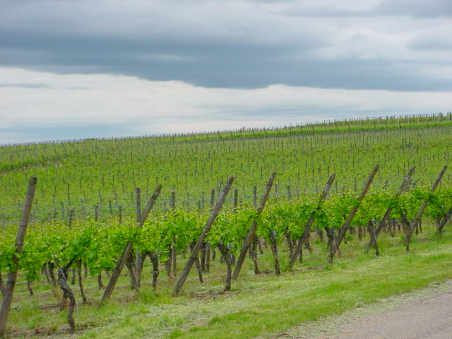 Alsace Vineyard